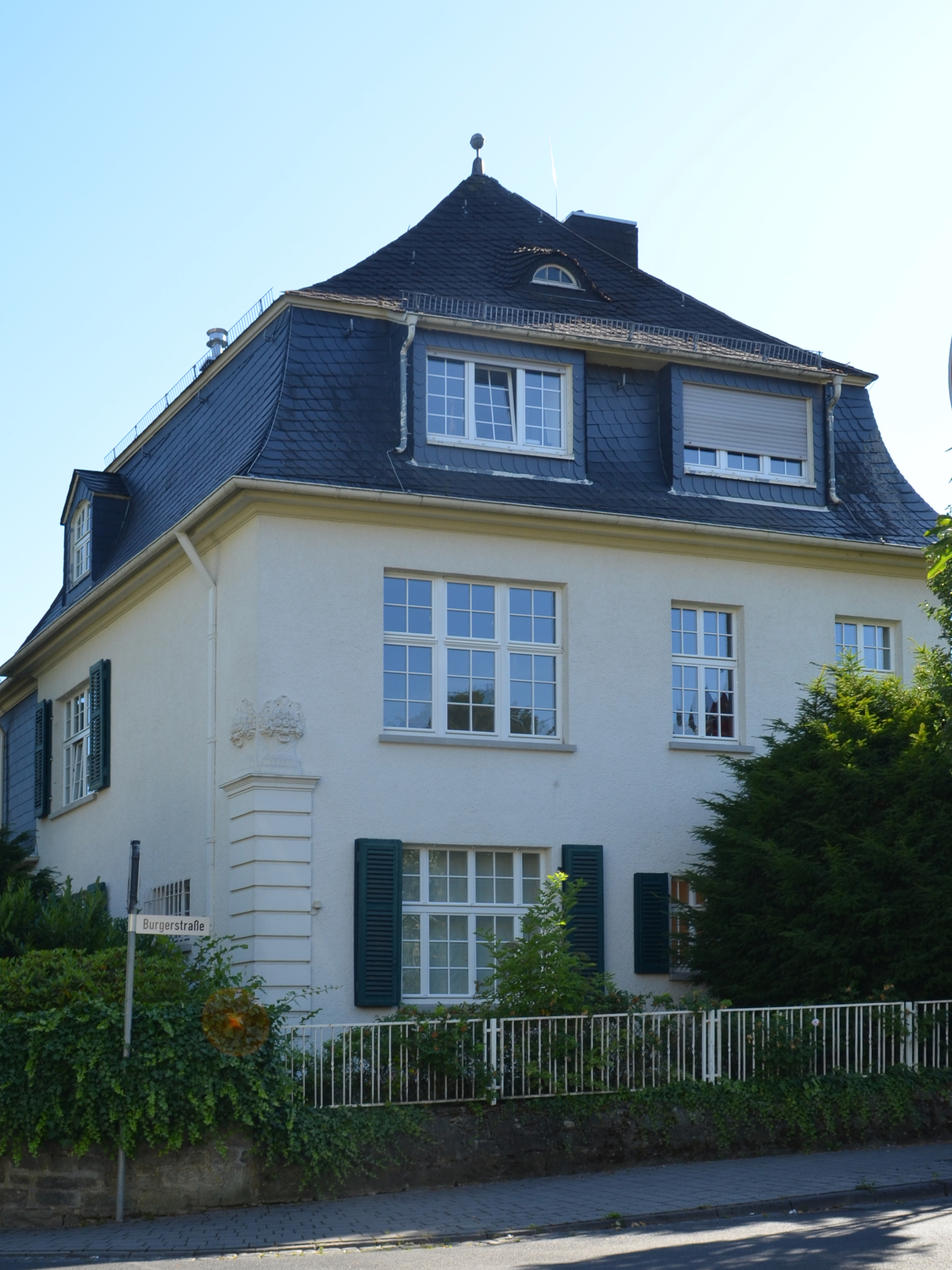 Villa Wucherer, Kronberg, Burgerstraße 22